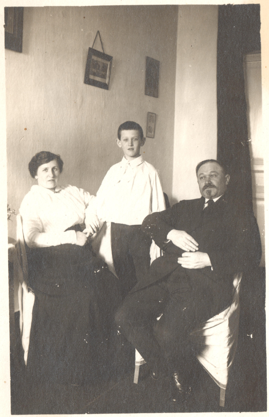 Адамович